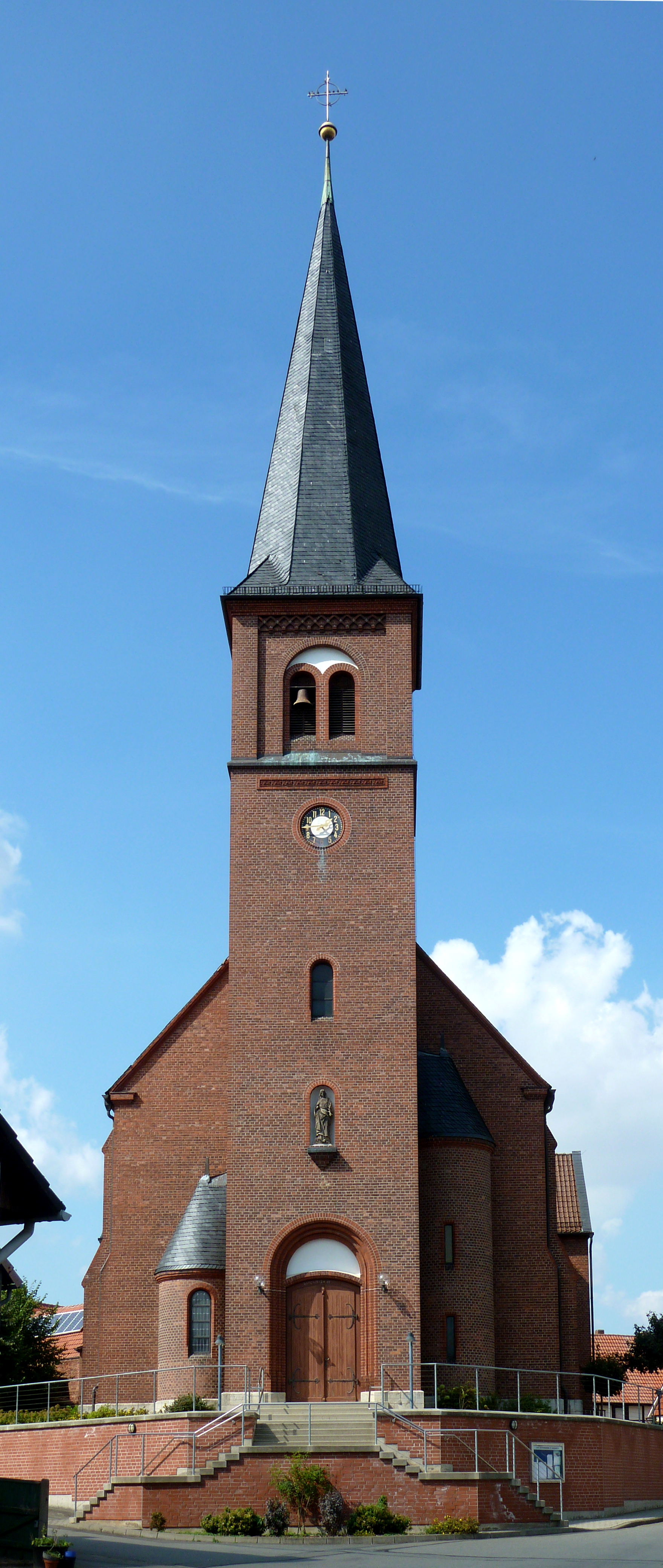 Katholische Kirche St. Margaretha in Rollshausen, Niedersachsen. Erbaut 1901/03 nach Plänen von Baurat R. Herzig aus Hildesheim als Nachfolgebau einer Barockkirche aus dem frühen 17. Jahrhundert